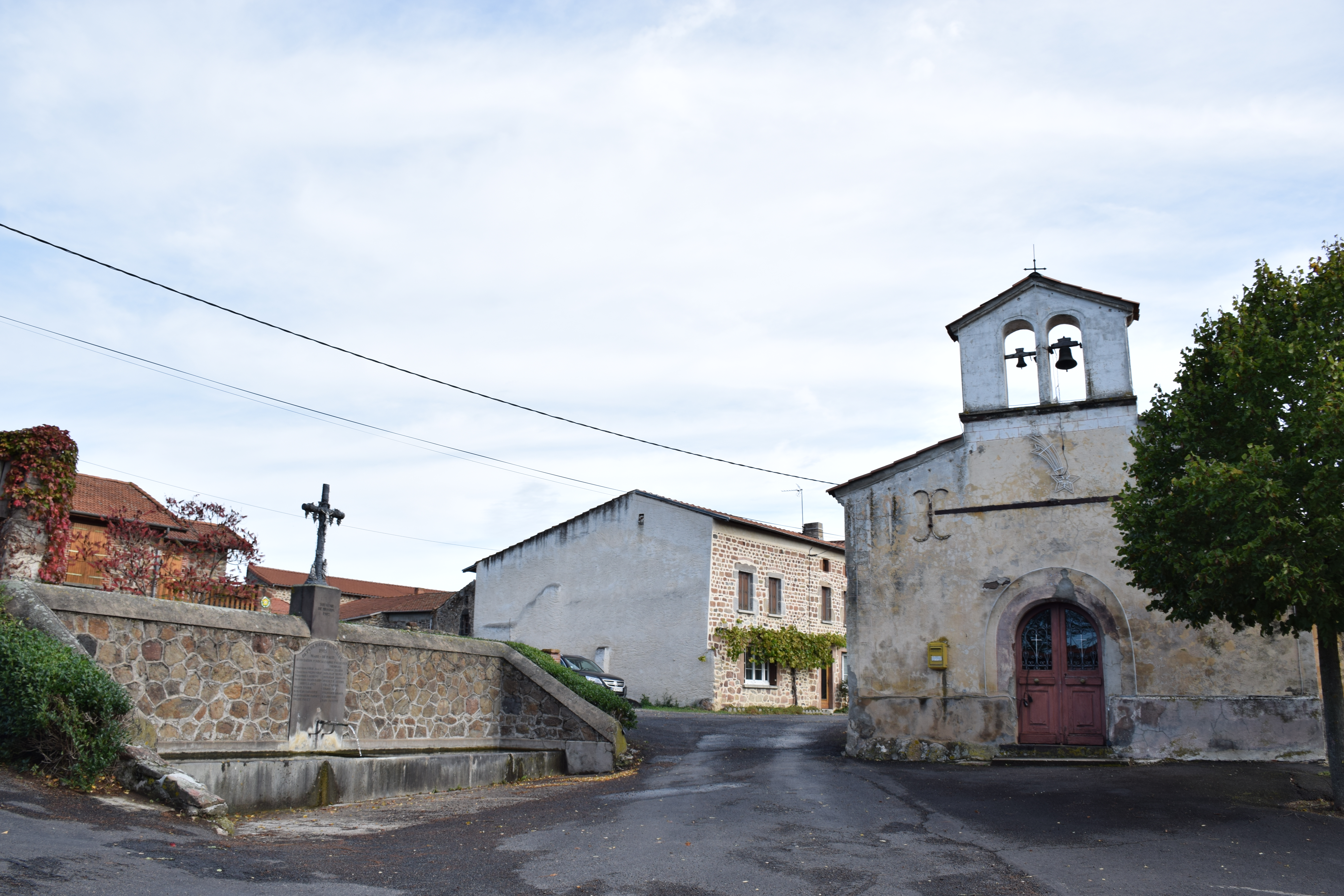 L'église d'Allevier (commune d'Azérat, Haute-Loire, France).